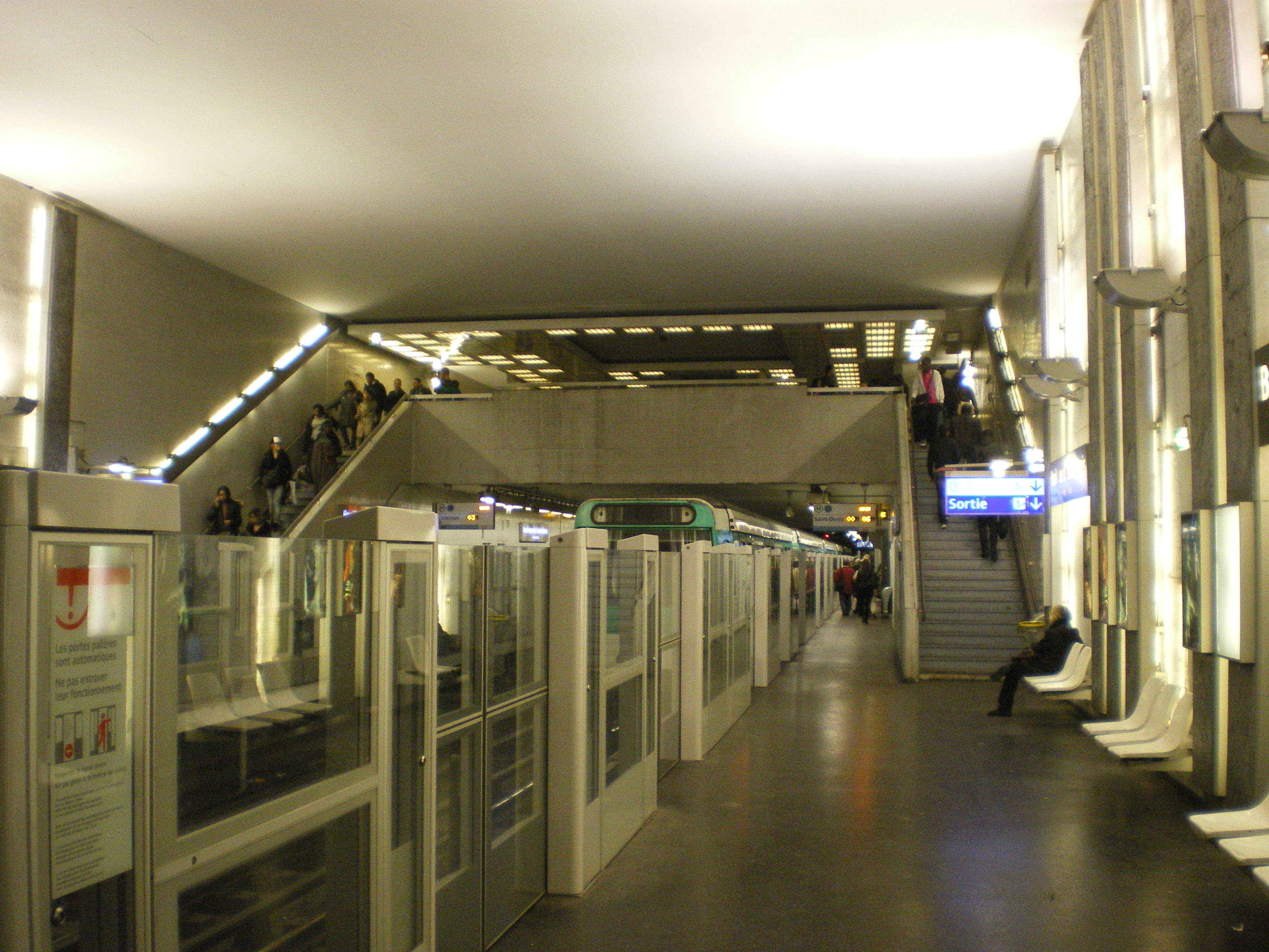 Station Basilique de Saint-Denis